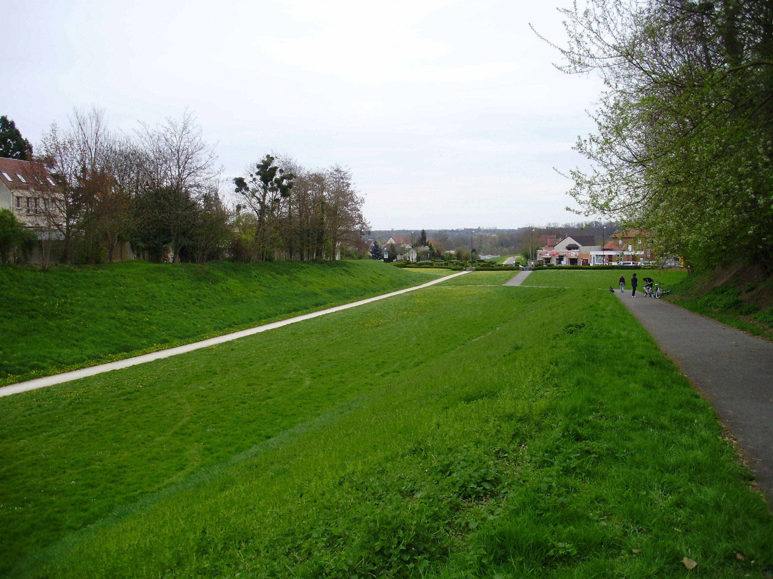 Villecresnes, Val-de-Marne, France : site de l'ancienne gare de Villescresnes entre la rue du Lieutenant-Dagorno et l'avenue Foreau (le bâtiment voyageurs était près du bas de la pelouse)